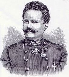 Weinek László a fotografikus asztrometriai módszerek úttörője